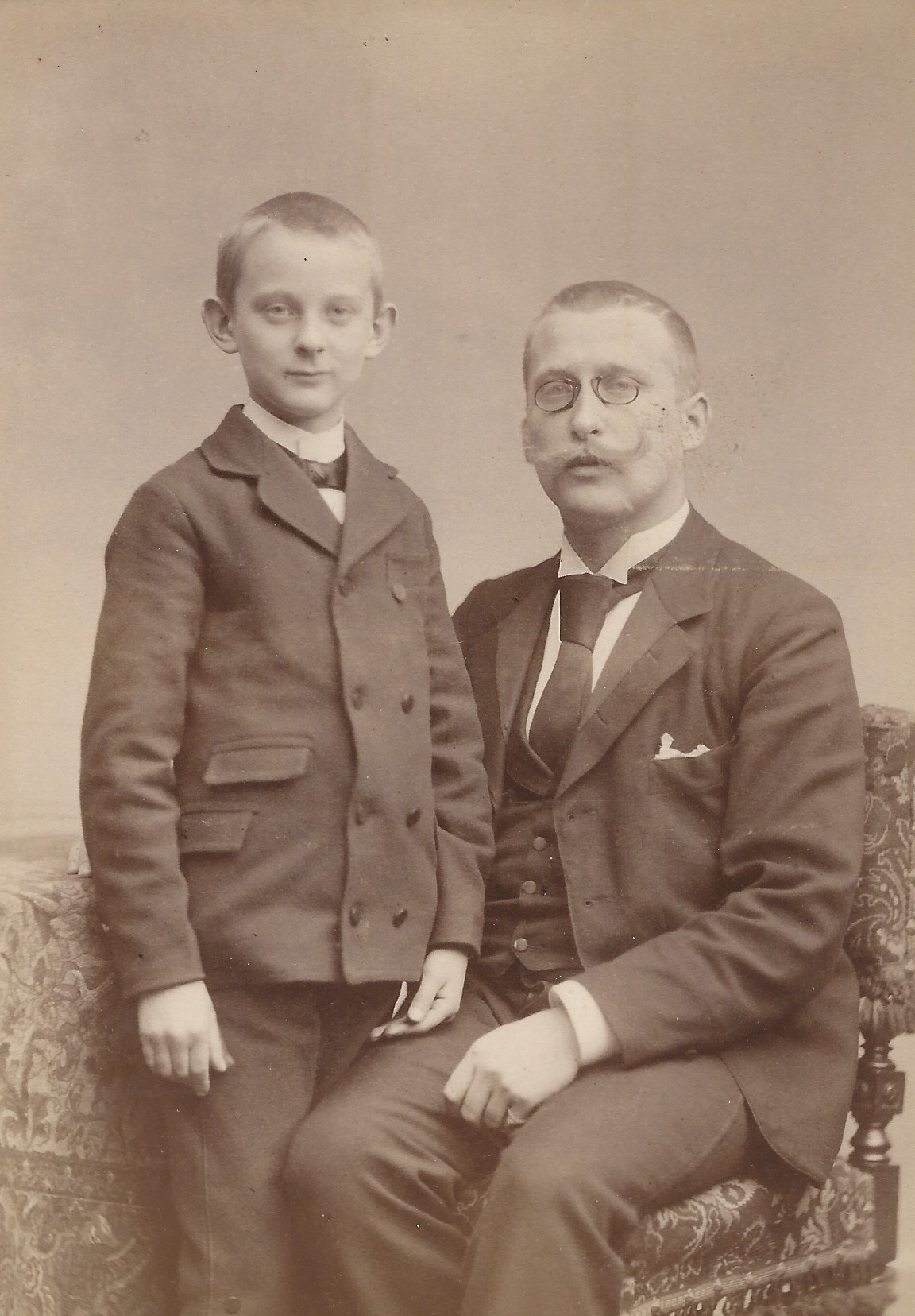 Die beiden Brüder Konrad (rechts) und Ernst Biesalski